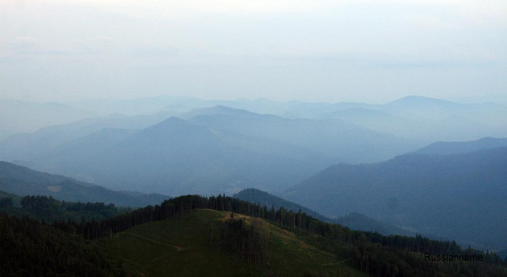 Околиці Тустані, Дрогобицький район, Львівська область